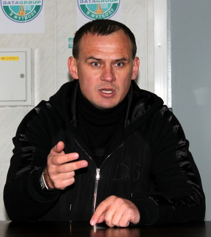 Вадим Заяць